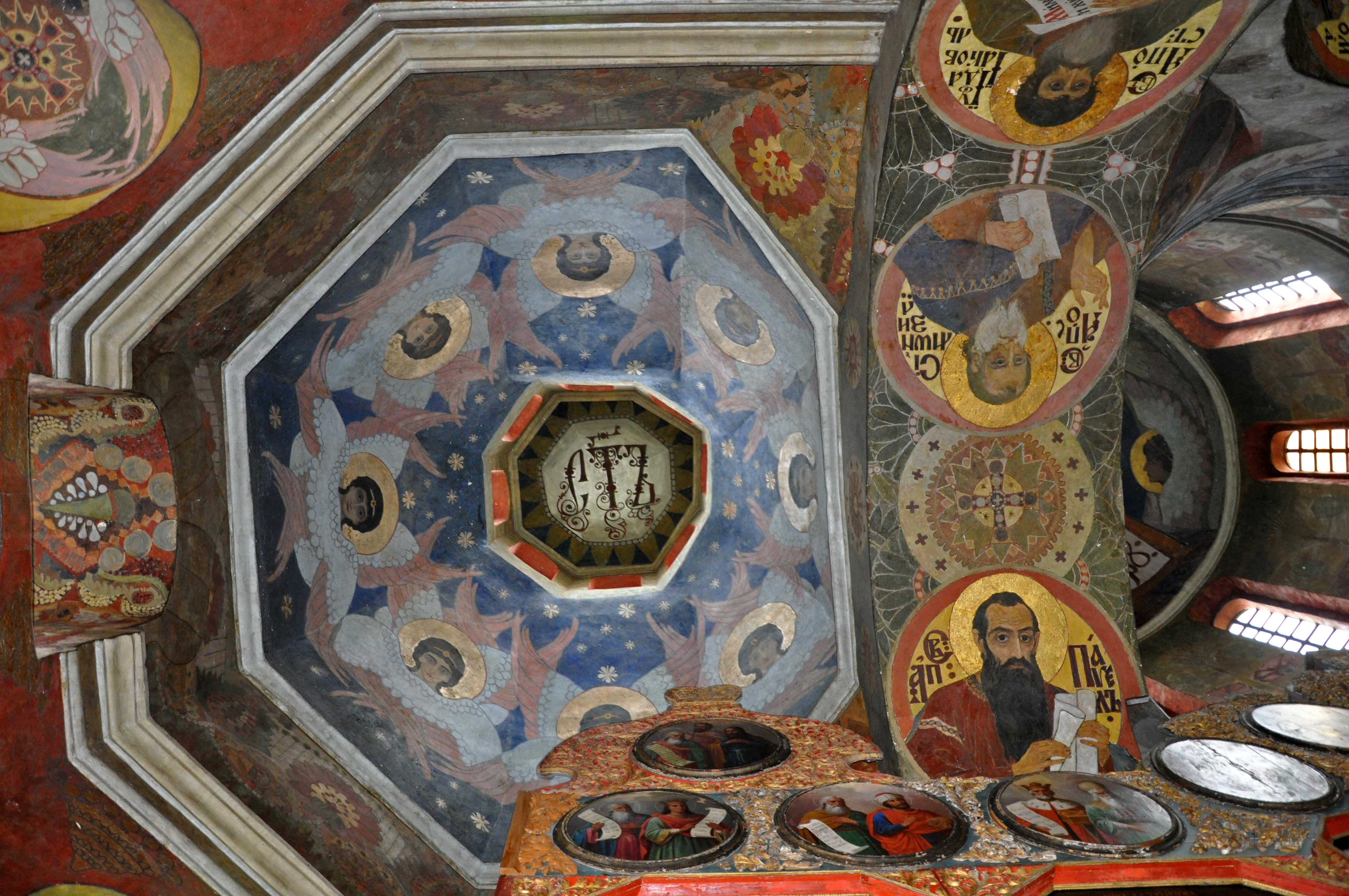 Розпис бічного купола. Церква Всіх Святих Києво-Печерської лаври. Внутрішній вигляд бічного купола